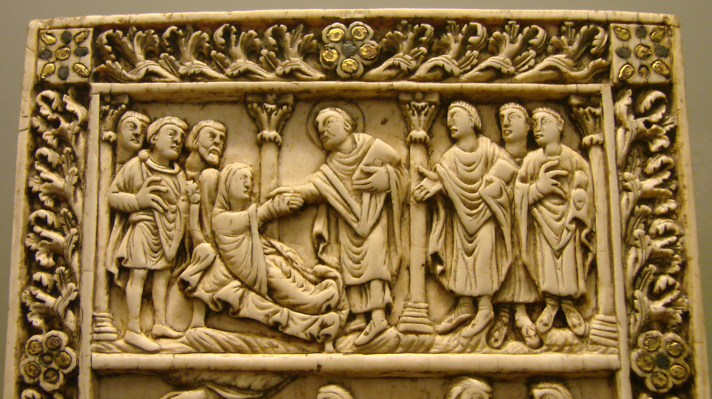 Plaque de reliure en ivoire, Reims, dernier quart du IXème siècle.Scènes de la vie de Saint Remi, détail: St Remi ressuscite une jeune fille. Musée de Picardie à Amiens.